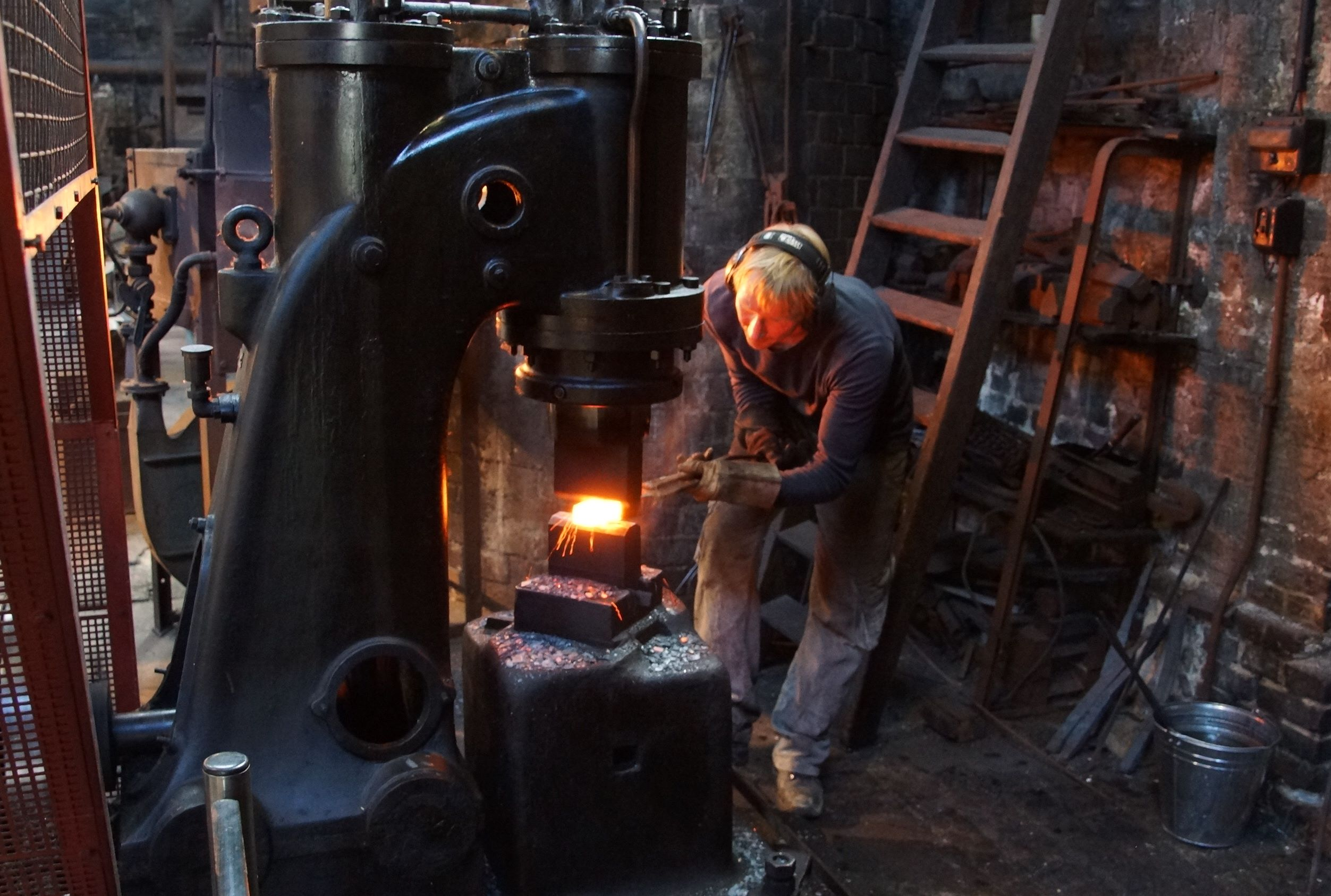 Schmieden von Damaszener Stahl im LVR-Industriemuseum Solingen